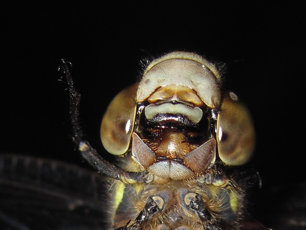 Macro of a dragonfly